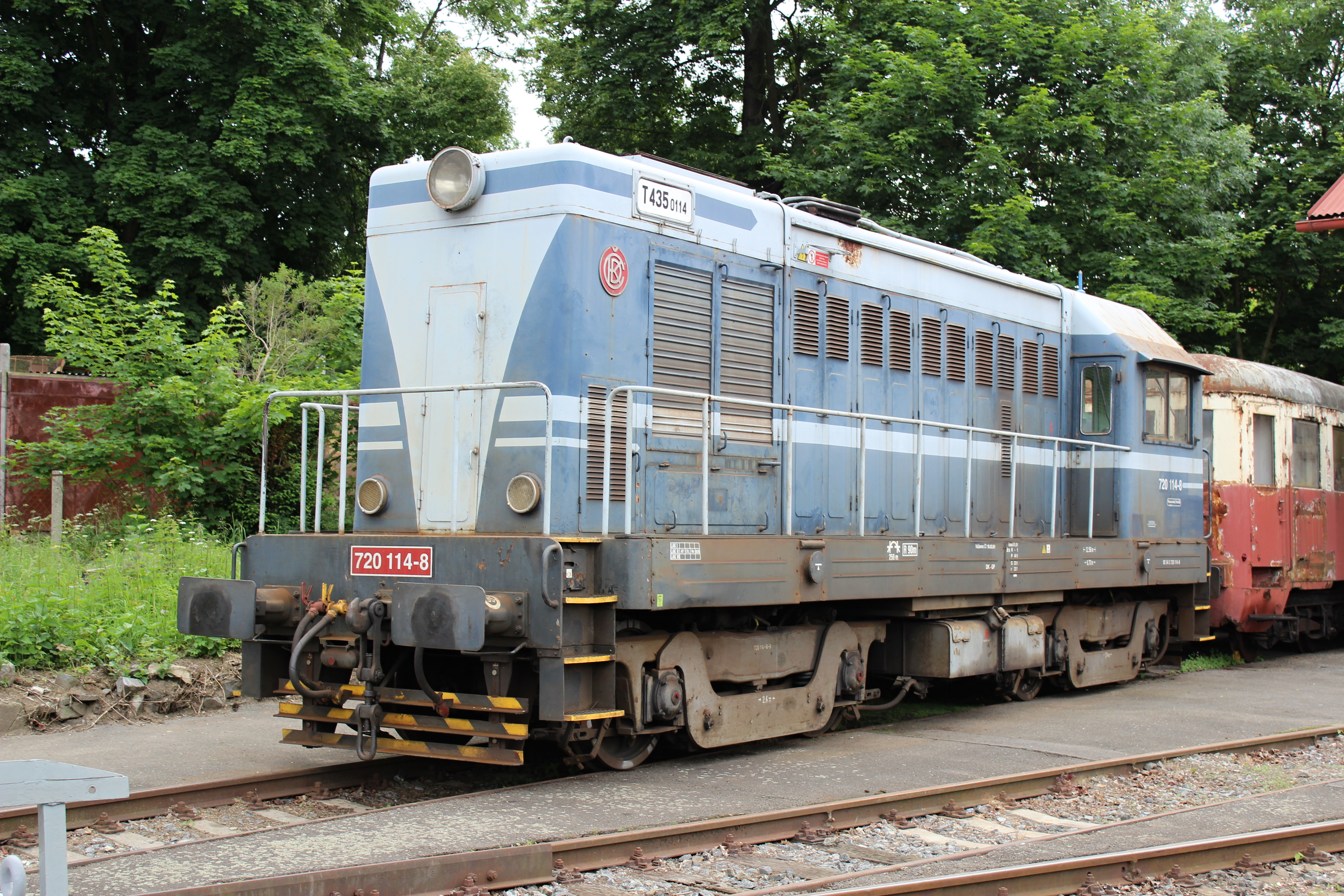 Lokomotiva řady 720 je čtyřnápravová dieselová lokomotiva s elektrickým přenosem výkonu. Pod označením T435.0 byla vyráběna postupně ve čtyřech sériích v letech1958 až 1963 lokomotivkou ČKD Praha. Pojezd lokomotivy tvořily dva dvounápravové podvozky se jhy - tyto podvozky má stroj zobrazený na snímku (jinak také zvané „pensylvánské“podvozky). Lokomotivy měly výborné adhezní vlastnosti, ale podvozky měly příliš tvrdý chod, a proto byly u stroje T 435.087 nahrazeny tzv. kývačkovými podvozky. Dále byla poprvé použita hydrodynamická převodovka HVK pro pomocné pohony (ventilátor chlazení akompresor – to umožnilo zvýšit spolehlivost, protože původní pružné „Hardyho“ spojky trpěly v provozu nízkou životností). Měla zelený nátěr a změněný převod na dvojkolích, takže vzrostla nejvyšší rychlost z šedesáti na 80 km/h. Prvé tři série lokomotiv měly tmavomodrý nátěr v kombinaci s krémovou barvou. Lokomotivy čtvrté výrobní série (od č. 139) měly kývačkové podvozky, převodovku HVK a nátěr byl zelený. Pro potřeby Československých státních drah bylo vyrobeno 150 ks (včetně lokomotiv T435.0495 až 0499, které byly původně vyrobeny pro rozchod 1524 mm). Pro vlečky průmyslových podniků v Československu pak bylo vyrobeno 83 kusů těchto lokomotiv. Nemalý počet strojů této řady byl dodán pro zahraniční železniční dopravce do Albánie, Iráku a NDR. ČSD užívaly lokomotivy ř. T 435.0 při posunu i pro traťovou službu v nákladní dopravě. V osobní dopravě se uplatnily jen v malé míře. Dnes (10/2013) je již většina strojů této řady zrušena. Některé z nich jsou zachovány pro muzejní účely nebo slouží malým soukromým přepravcům, či k přetahům při historických jízdách parních lokomotiv. Zdroj WIKIPEDIA